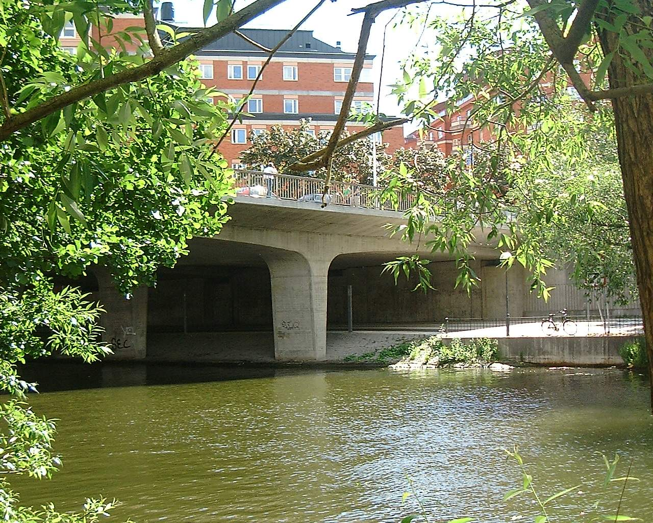 Klarabergsviadukten, Stockholm.